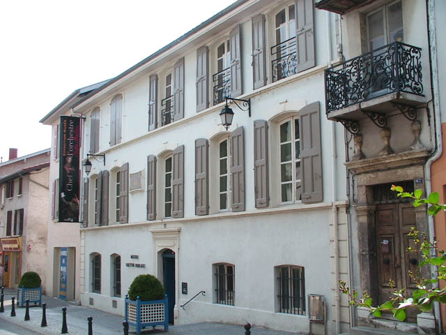 La Côte-Saint-André (38) France ; Maison natale d'Hector Berlioz ; 69 Rue de République